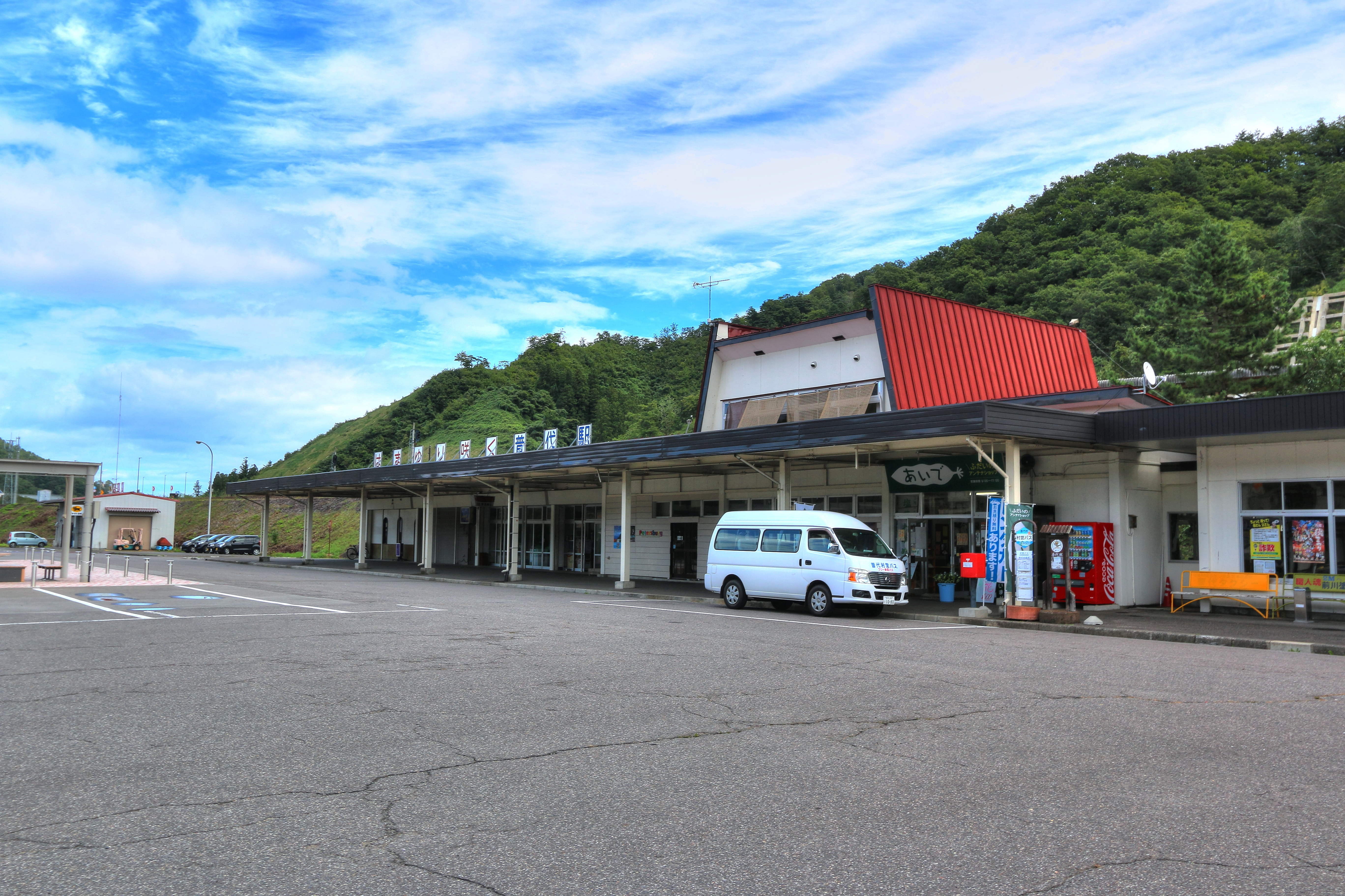 普代駅